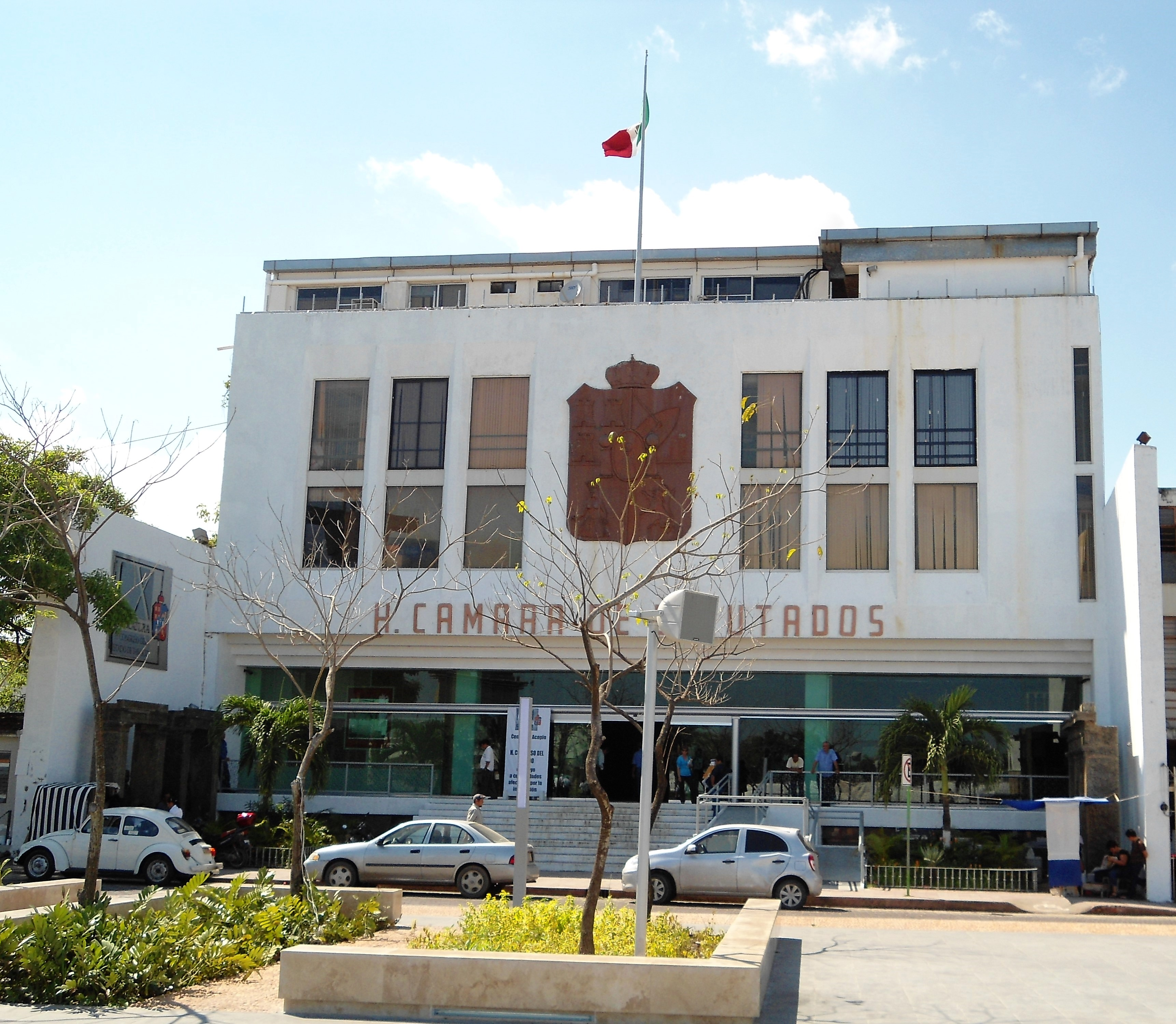 Edificio del H. Congreso del Estado de Tabasco. Villahermosa, Tabasco, México.